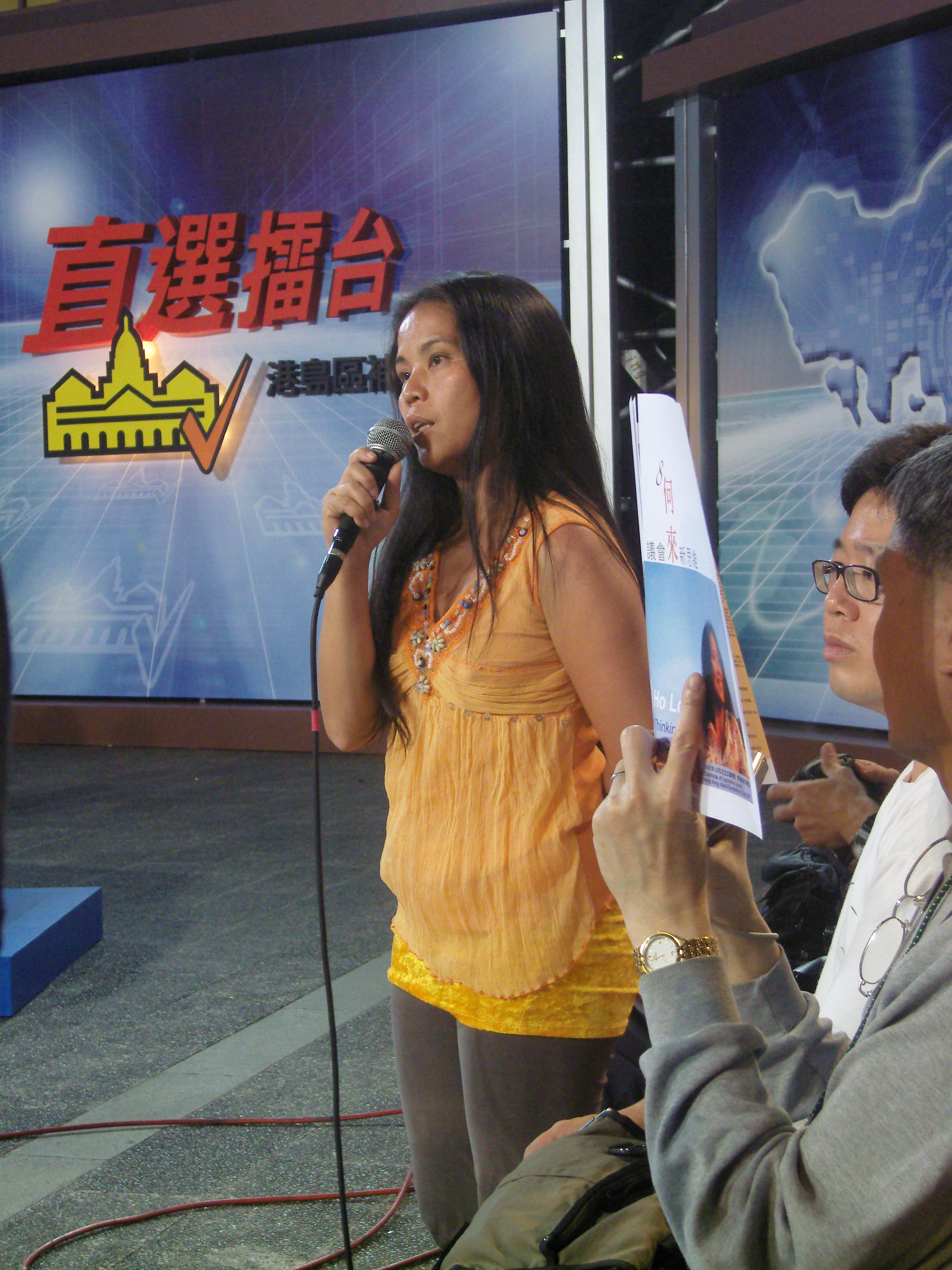 香港立法會港島區補選八大傳媒選舉論壇。